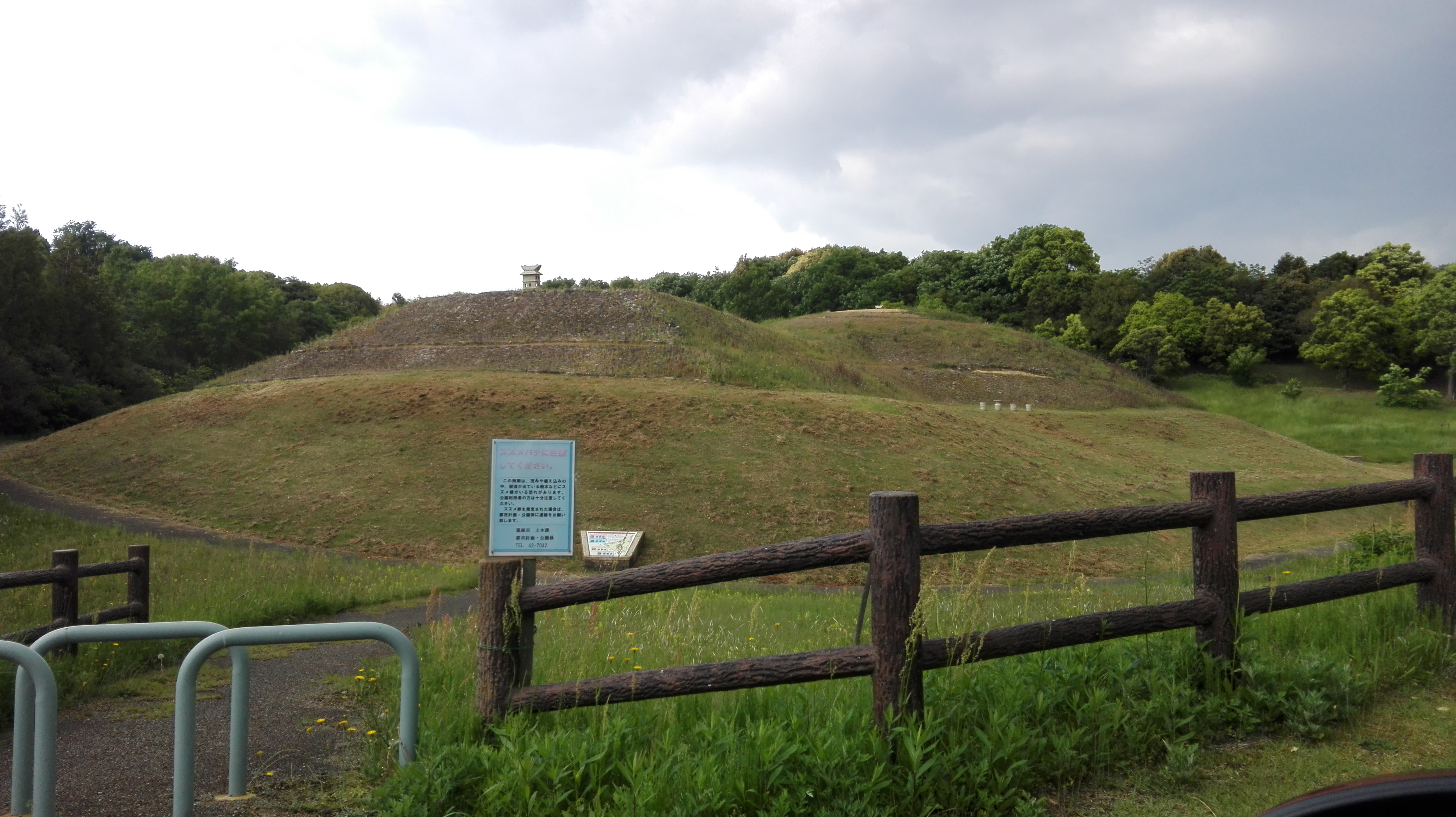 沖出古墳全景、付近の道路より撮影。